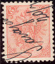 Bosnien - Issue 1879 (lithographed) - Hand cancelled SARAJEVO - Handschriftliche Entwertung Quelle: selbst erstellt